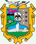 escudo de reynosa